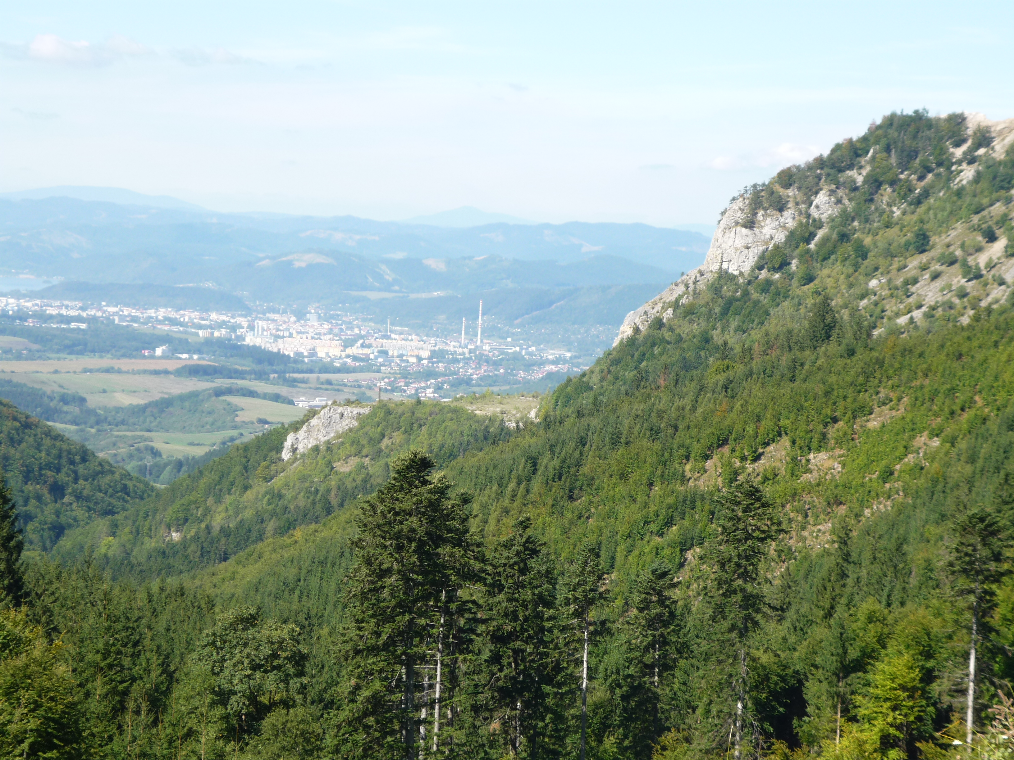 Žilina from Polom route